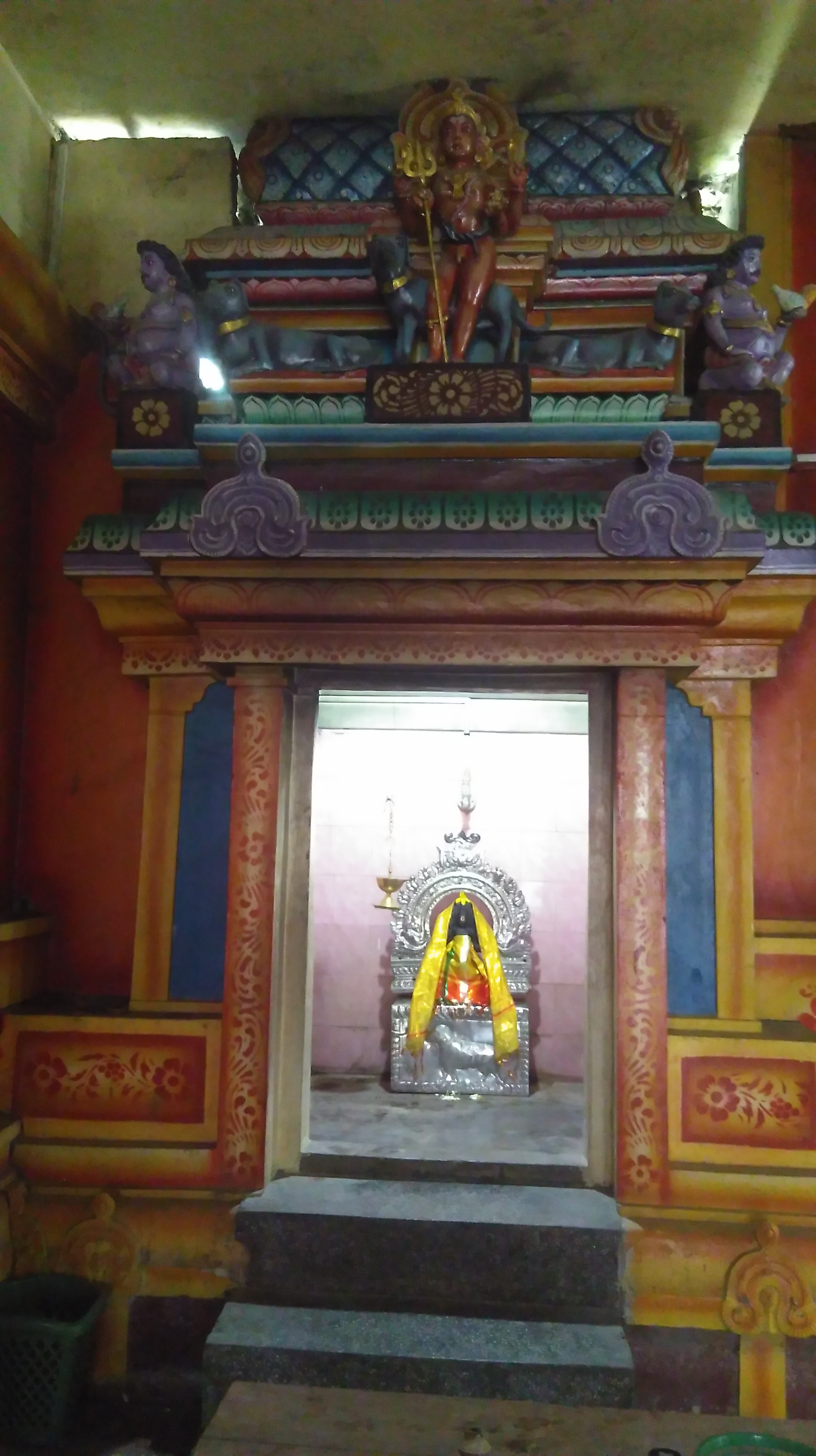 வைரவர் விக்கிரகம்